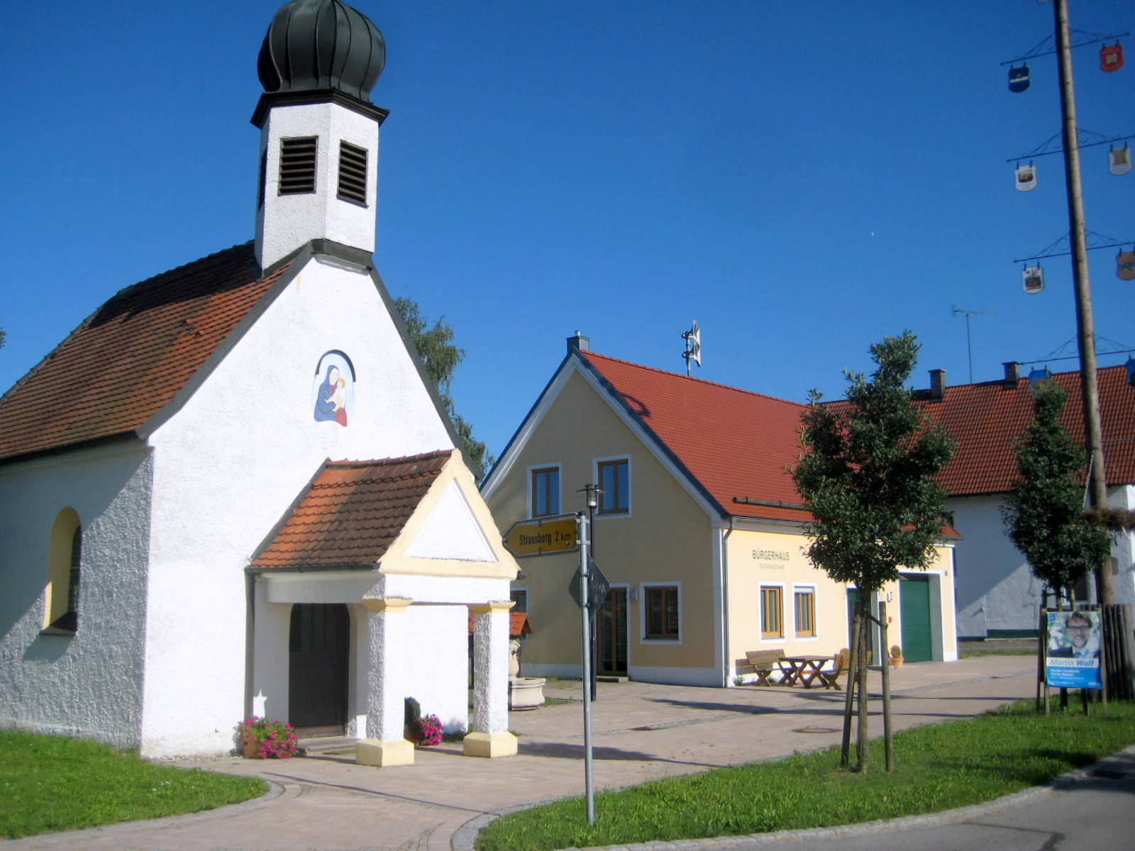 Schillwitzried ist ein Ortsteil von Geisenfeld, dieses ist eine Gemeinde des LKr. Pfaffenhofen a.d. Ilm.